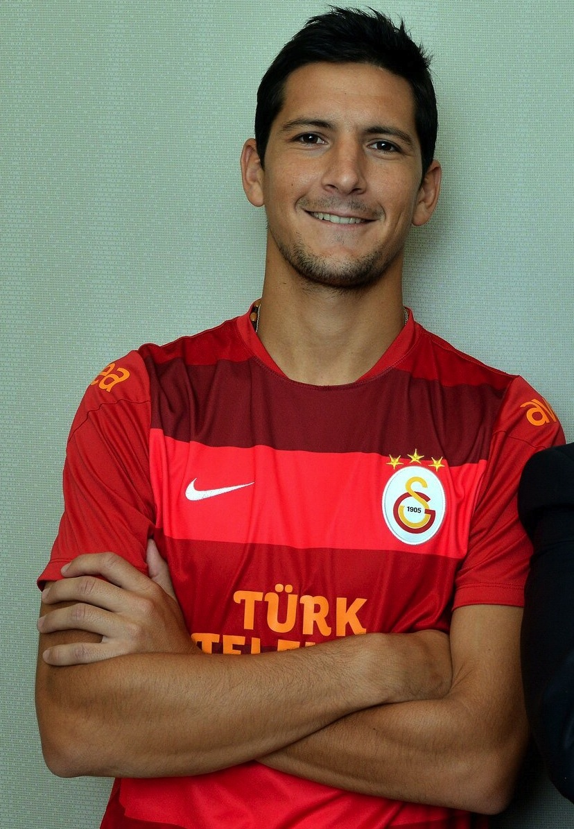 Guillermo Burdisso'nun Vikipedi için özel pozu.